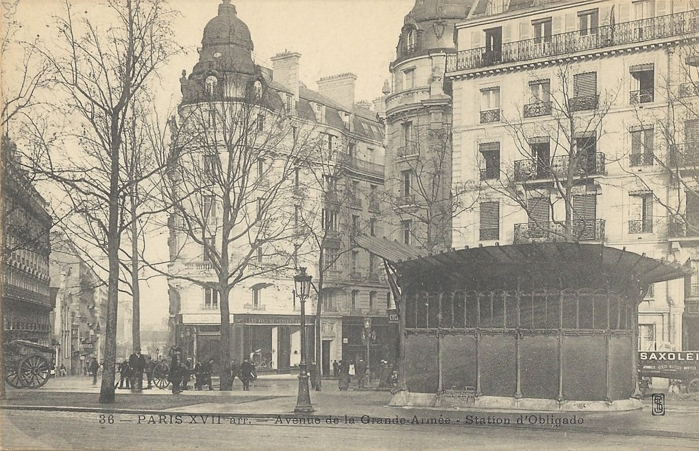 station de métro Obligado (actuellement Argentine) Avenue de la Grande armée Paris